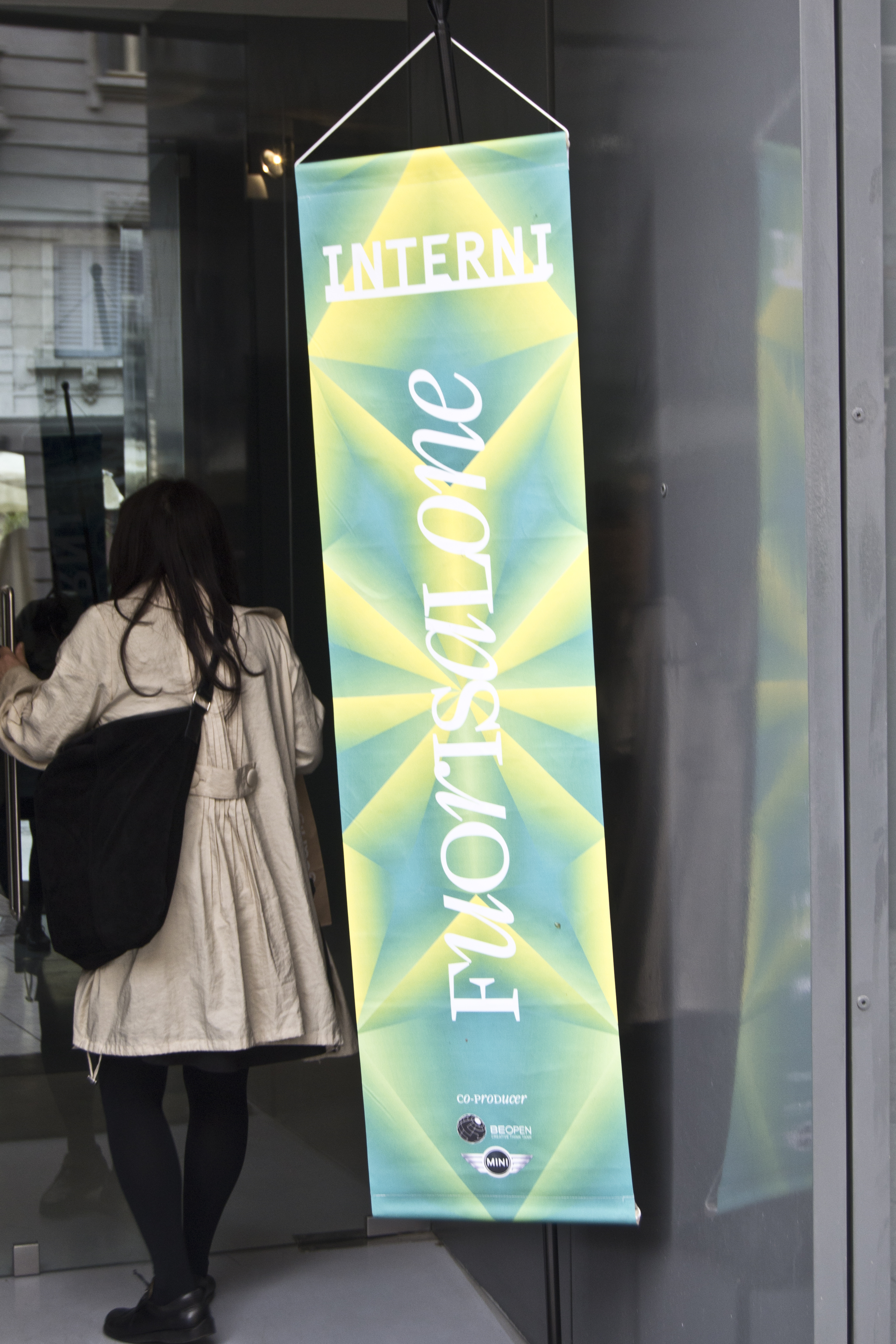 Fuorisalone in Corso Como